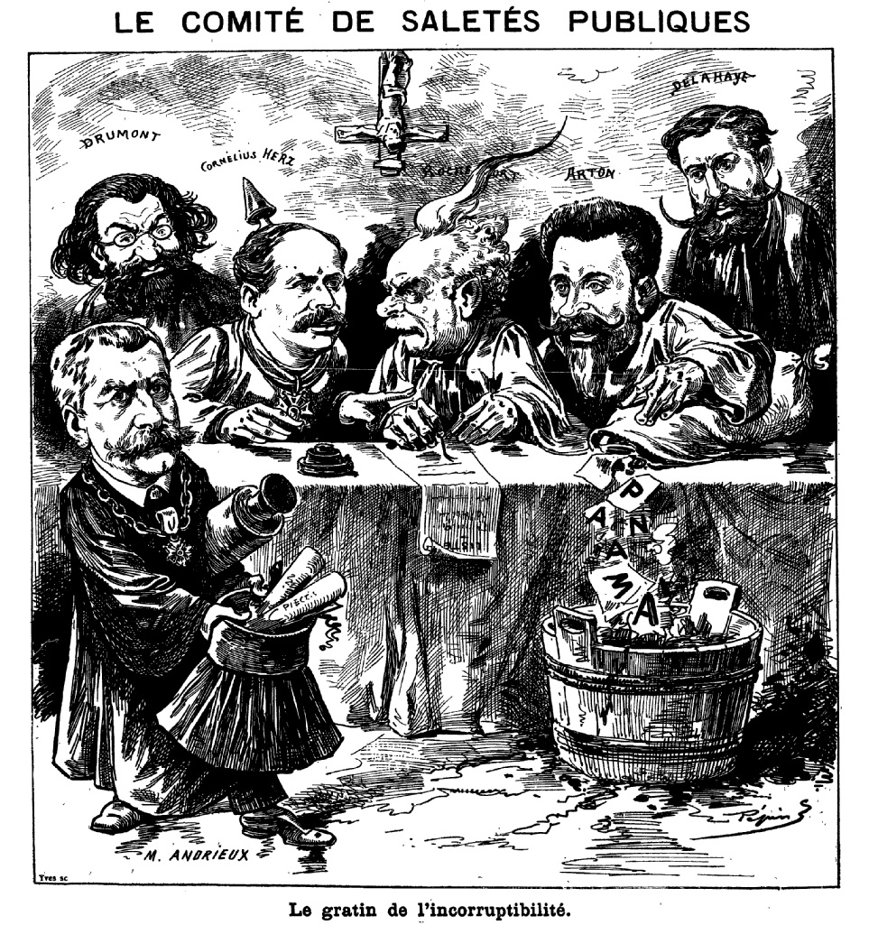 "Le comité de saletés publiques. Le gratin de l'incorruptibilité." (A propos de l'origine des révélations sur le scandale de Panama).